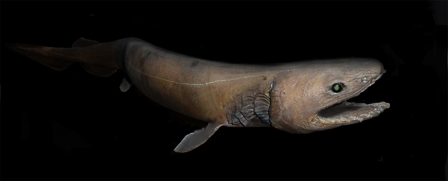 Chlamydoselachus anguineus at Aquarium tropical du Palais de la Porte Dorée (Paris)